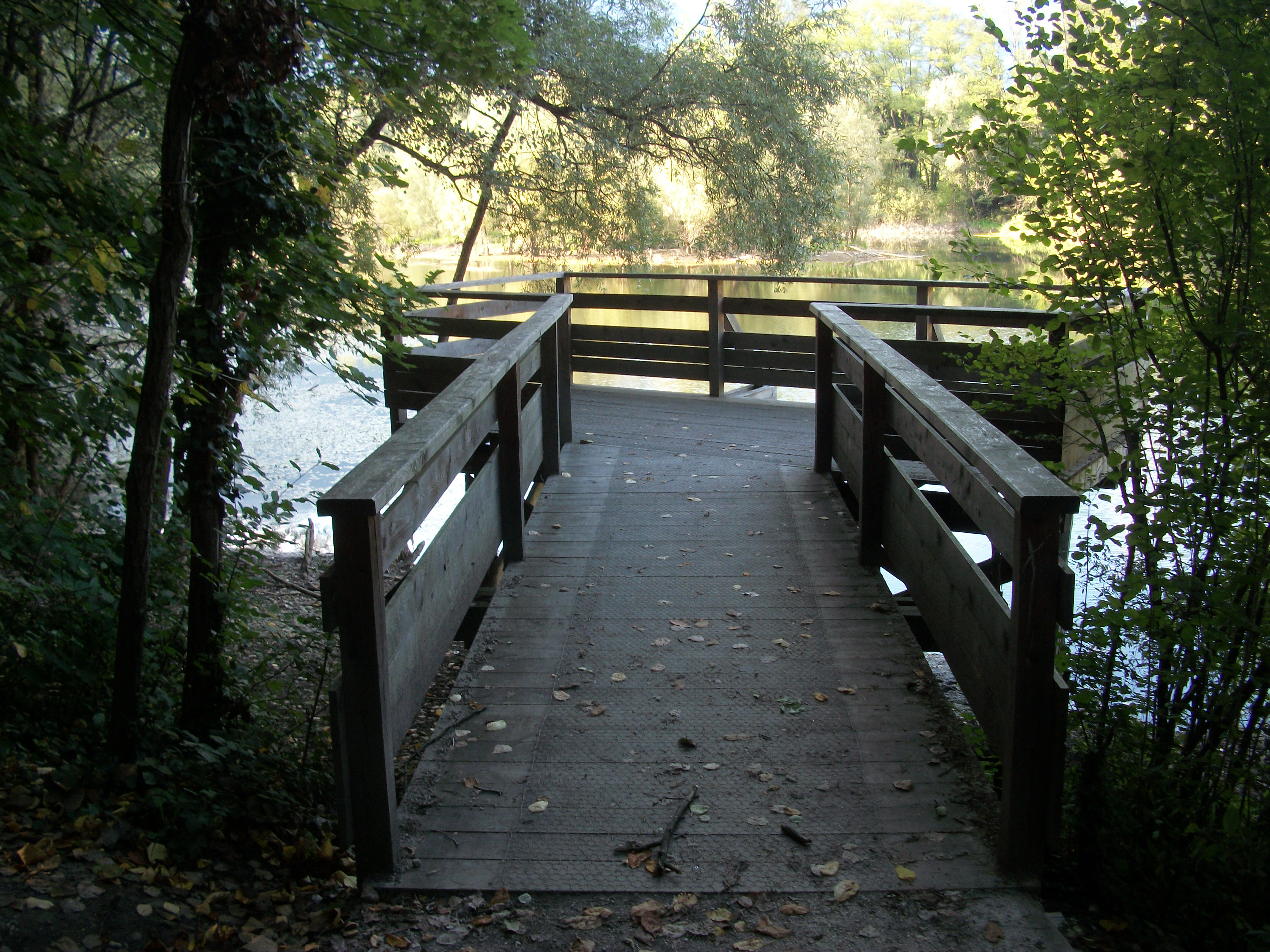 Espace Naturel Sensible de la Bâtie en Isère, France. Ponton d'observation sur l'étang Object location45° 13′ 50.89″ N, 5° 50′ 47.29″ E